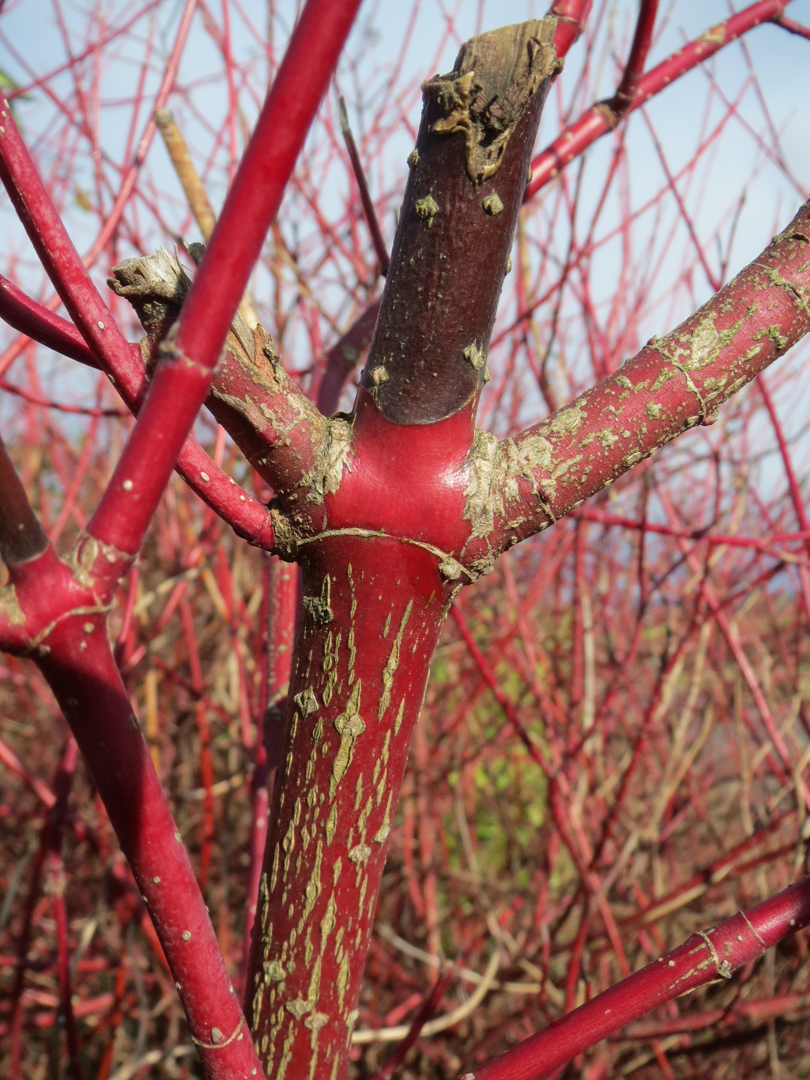 Tatarischer Hartriegel (Cornus alba) bei Hockenheim